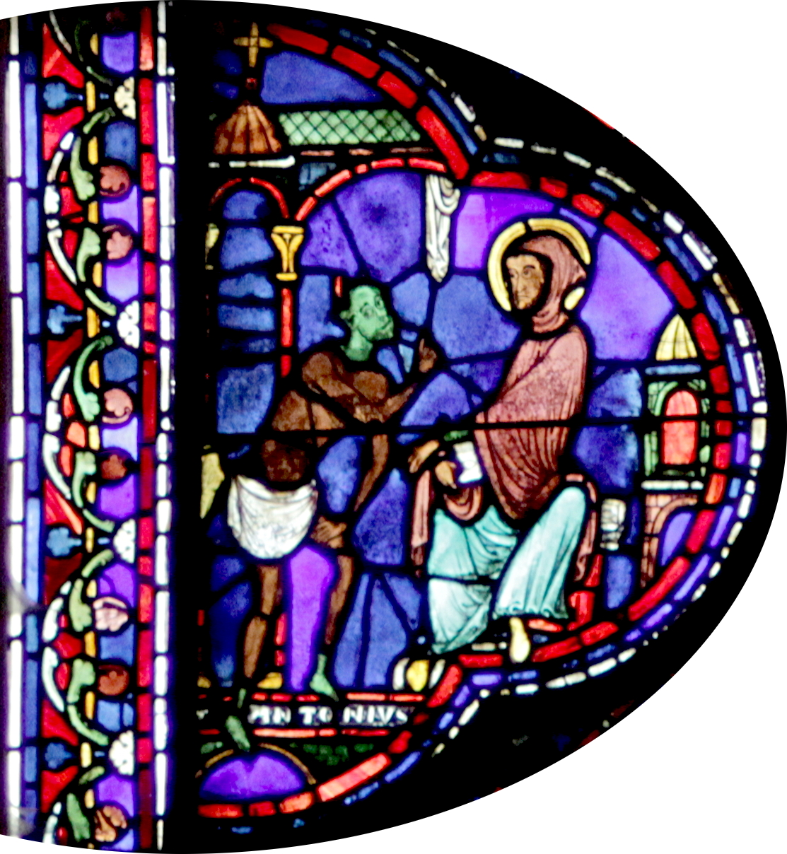 Excerpts from File:Vitrail Chartres-030-d rectifié.jpg